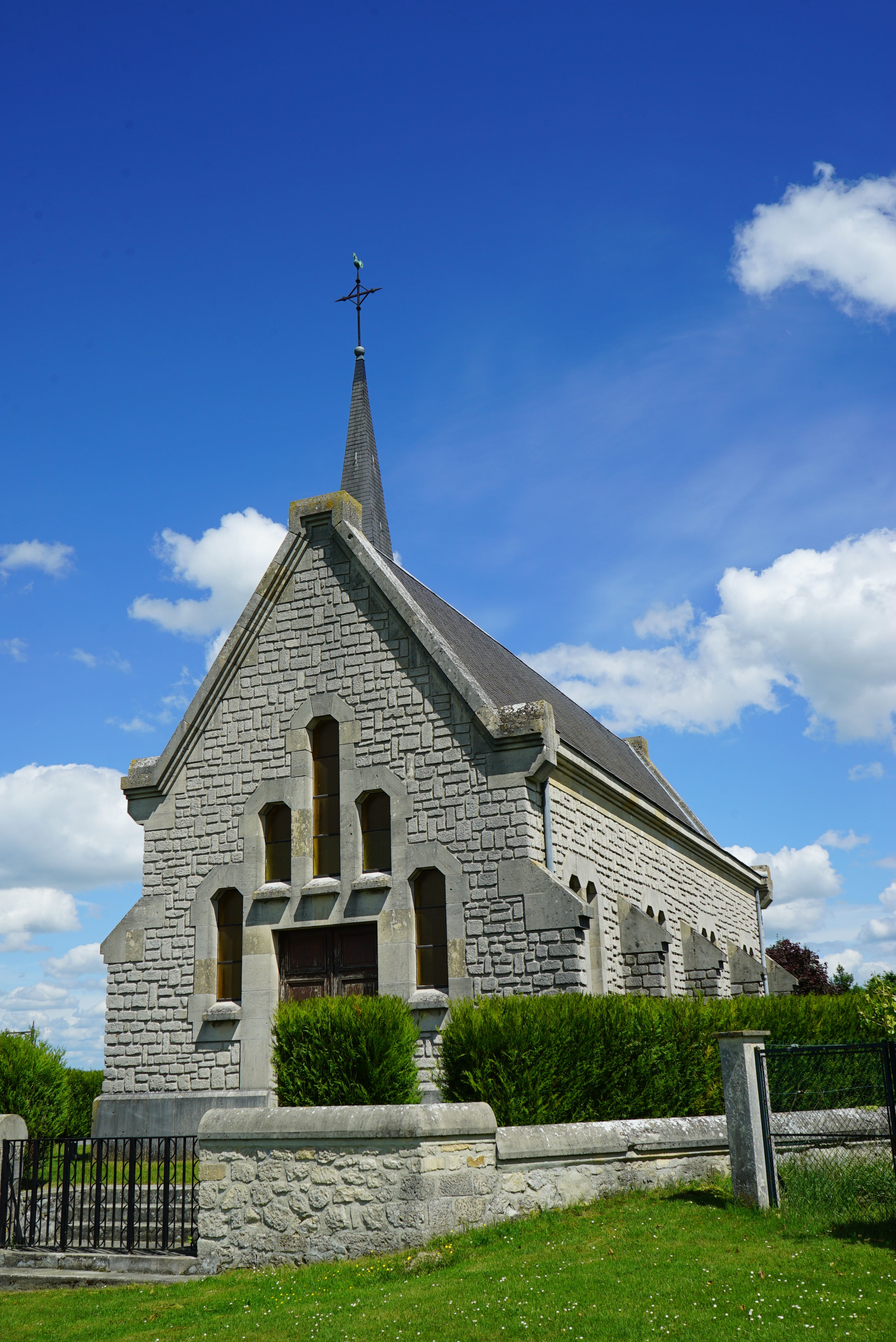 à Gernicourt.